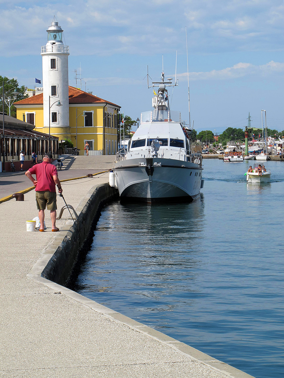 Cesenatico